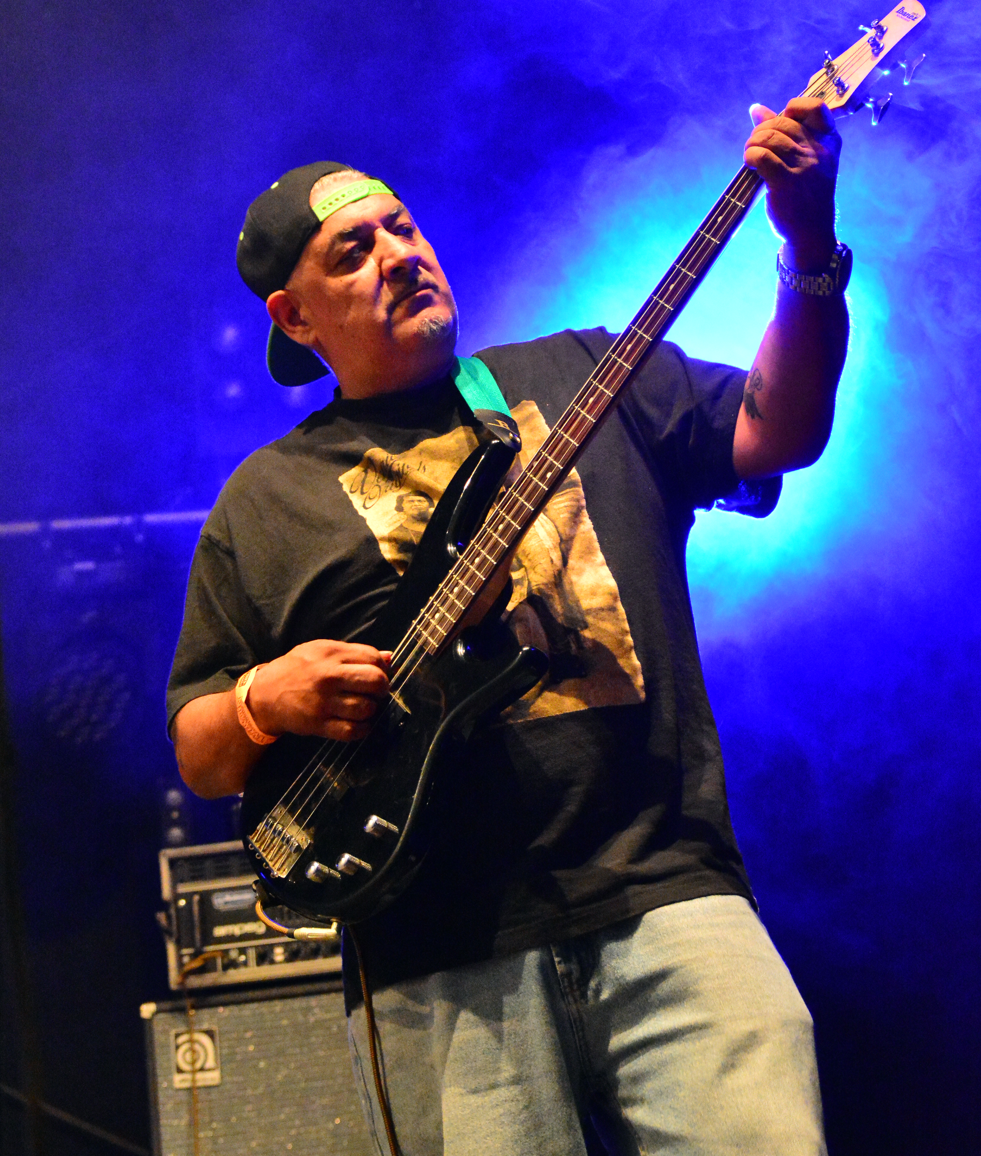 Luicidal beim „Wilwarin Festival 2015“